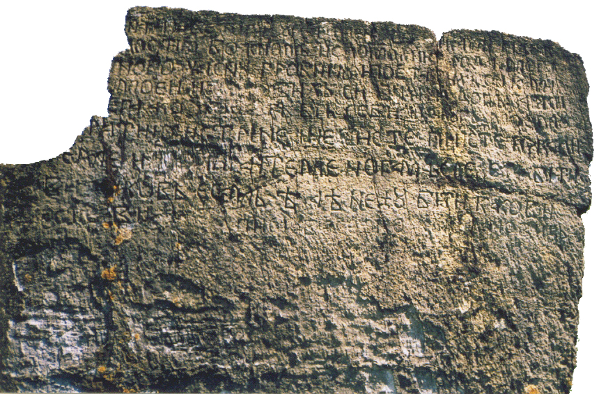 Epitaf Radojice Bilića na stećku.